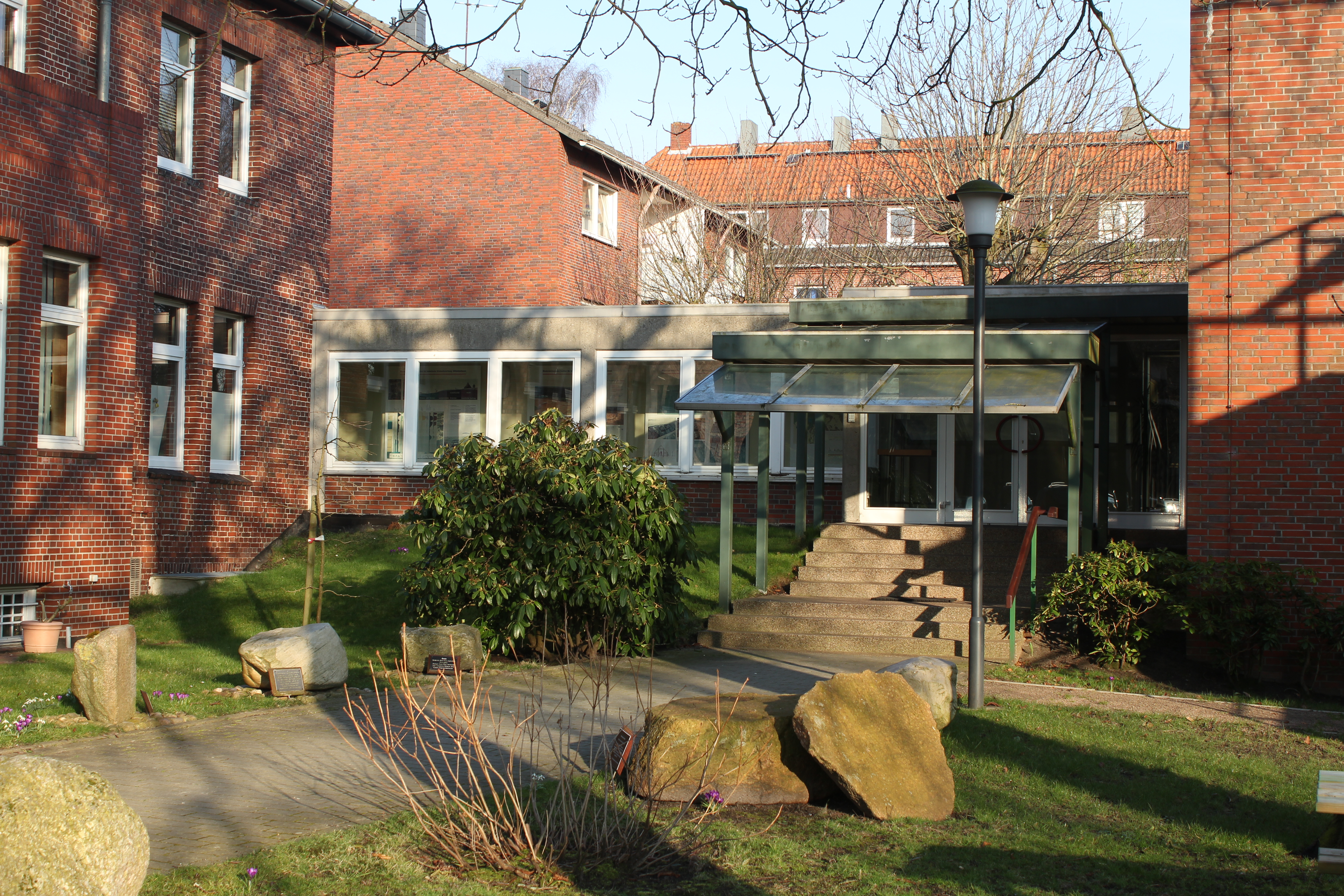 Eingang an der Rückseite des Niedersächsischen Instituts für historische Küstenforschung in der Viktoriastraße 26/28, 26389 Wilhelmshaven